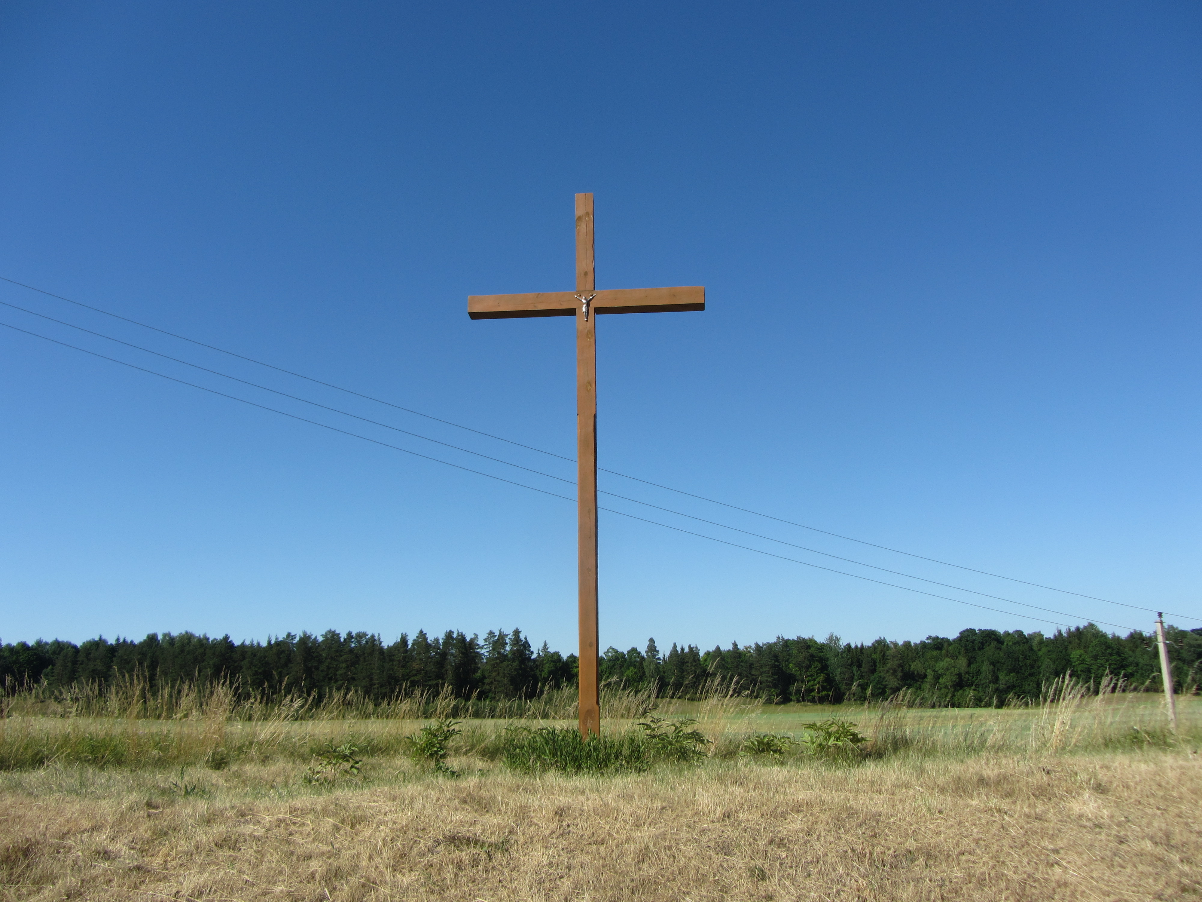 Bijūnai 21280, Lithuania